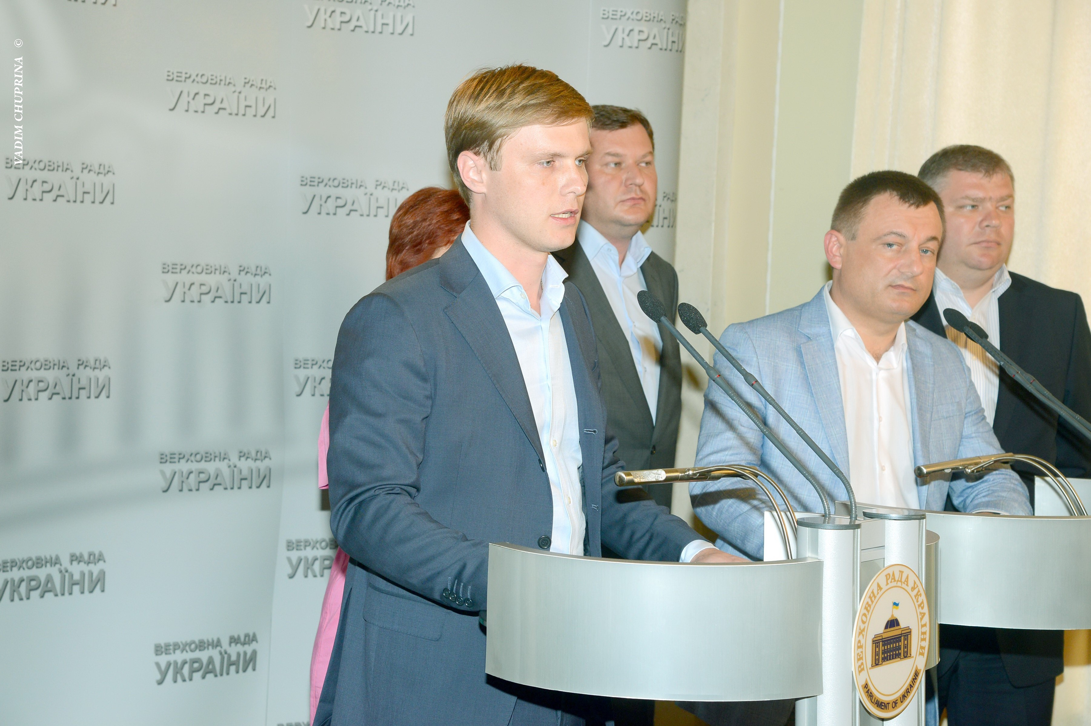 ВЕРХОВНА РАДА УКРАЇНИ 2013 , фото Вадим Чуприна